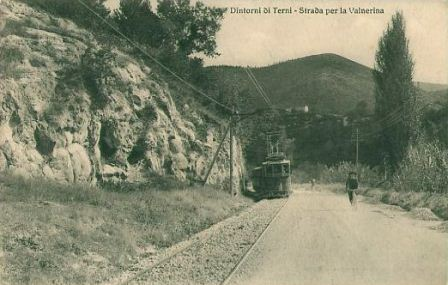 Strada della Valnerinca con la tranvia Terni-Ferentillo